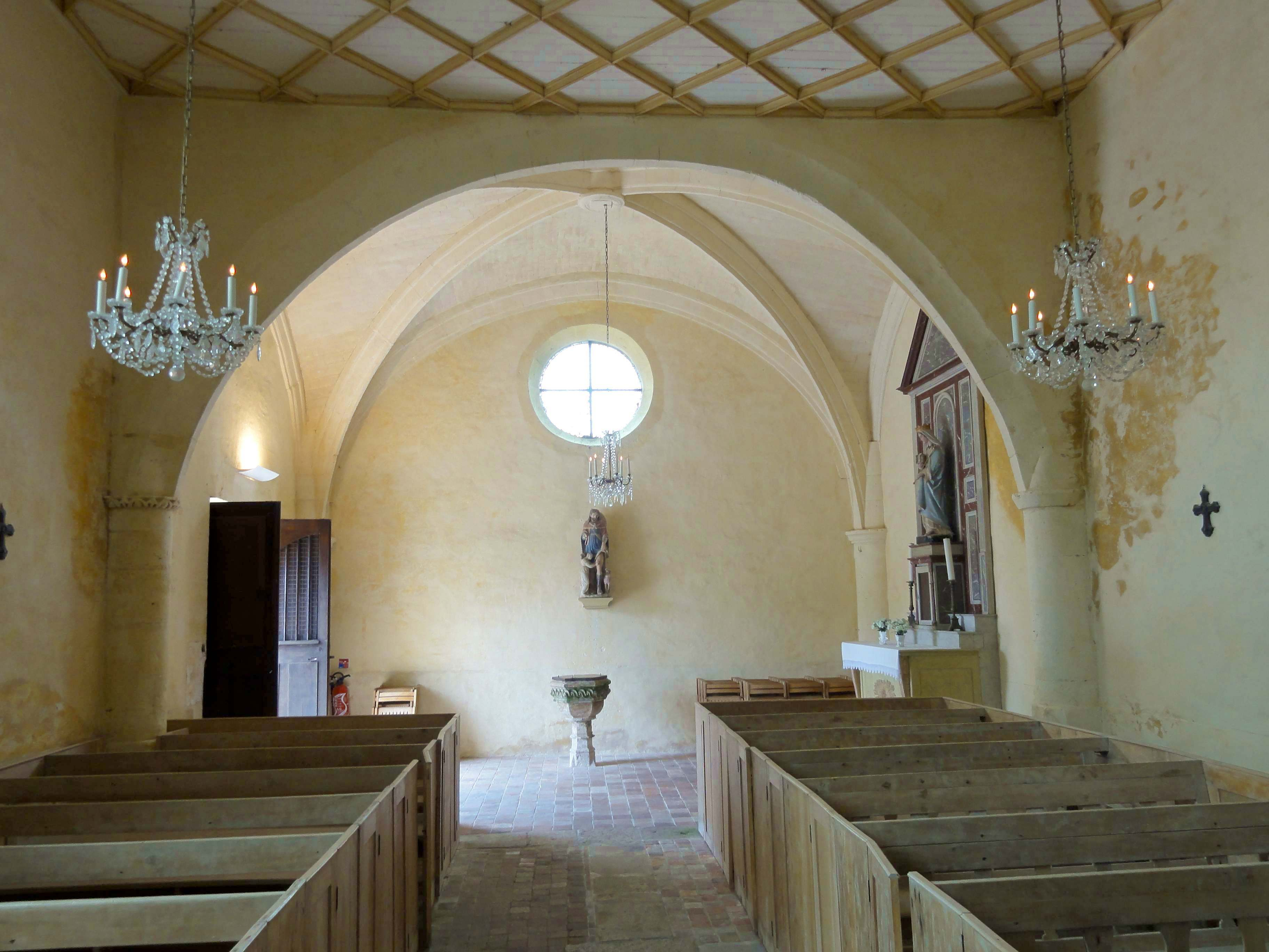 Intérieur de l'église (voir titre).